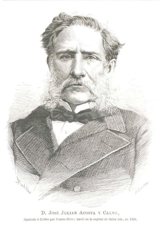 José Julián Acosta y Calvo, diputado a Cortes por Puerto Rico.